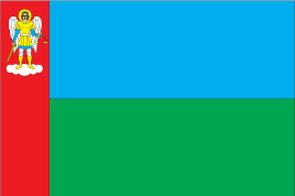 Прапор Овруцького району